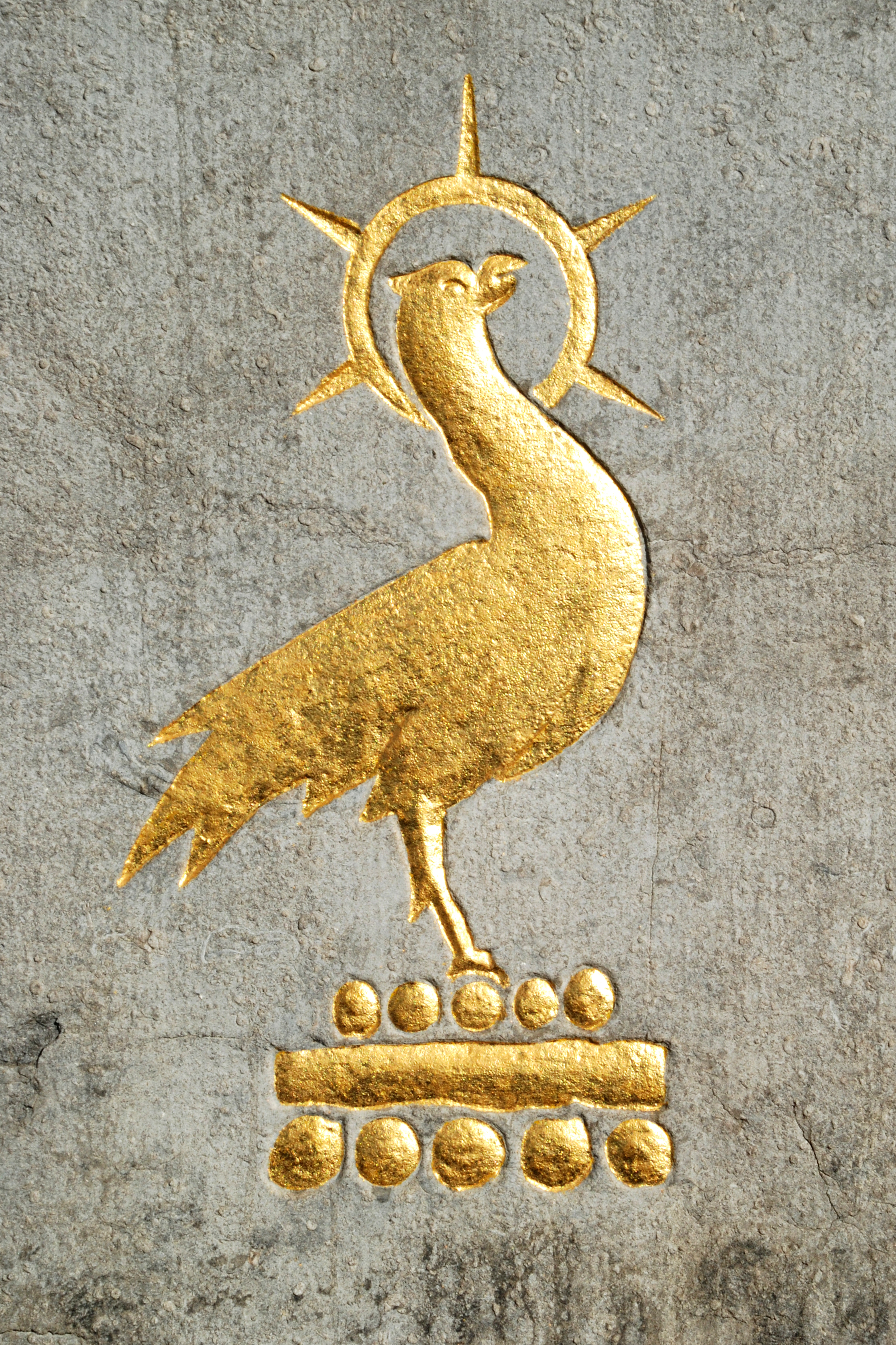 Belgique - Brabant wallon - Court-Saint-Etienne - Mausolée Goblet d'Alviella